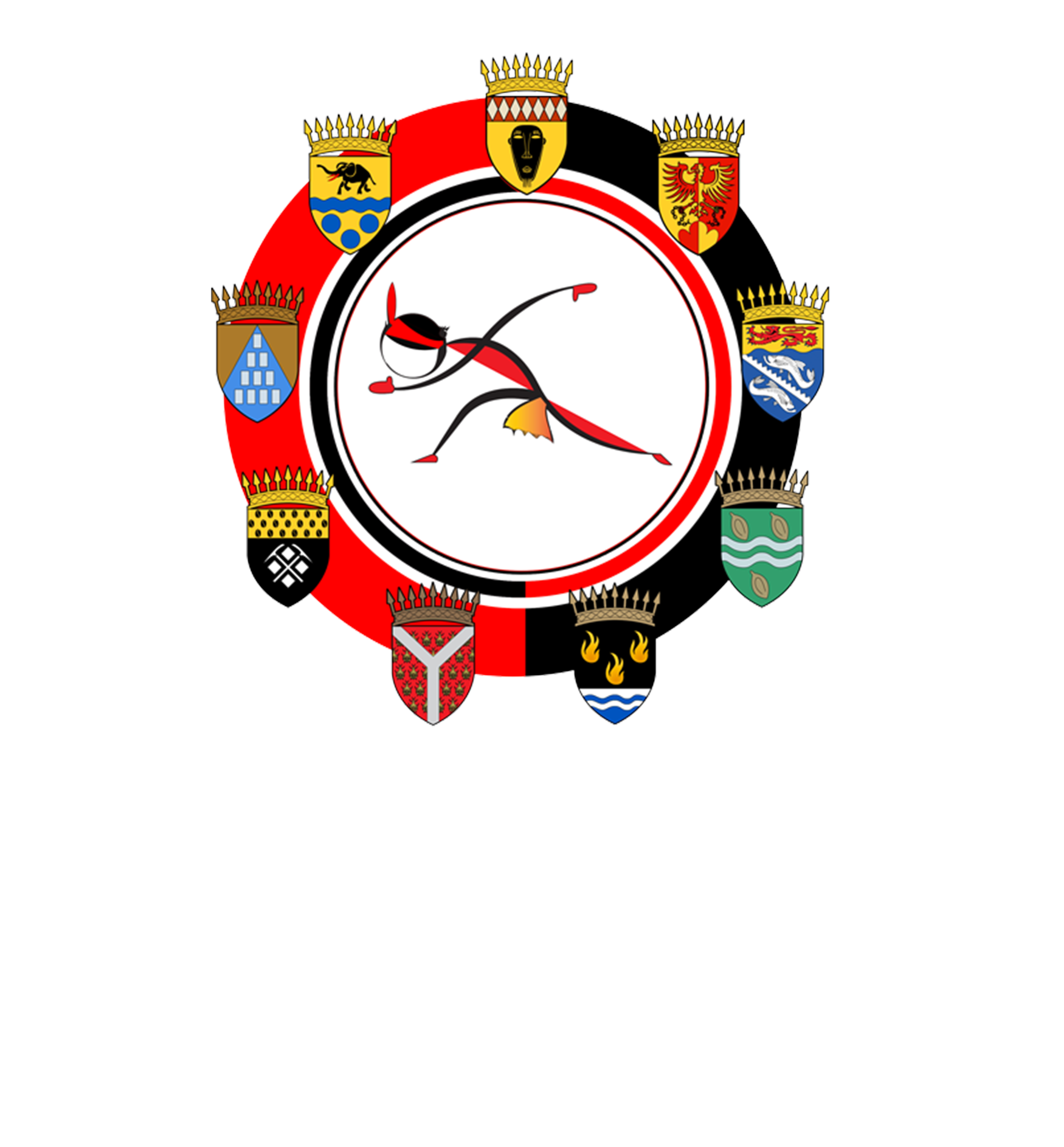 Logo du Tournoi des 9 provinces